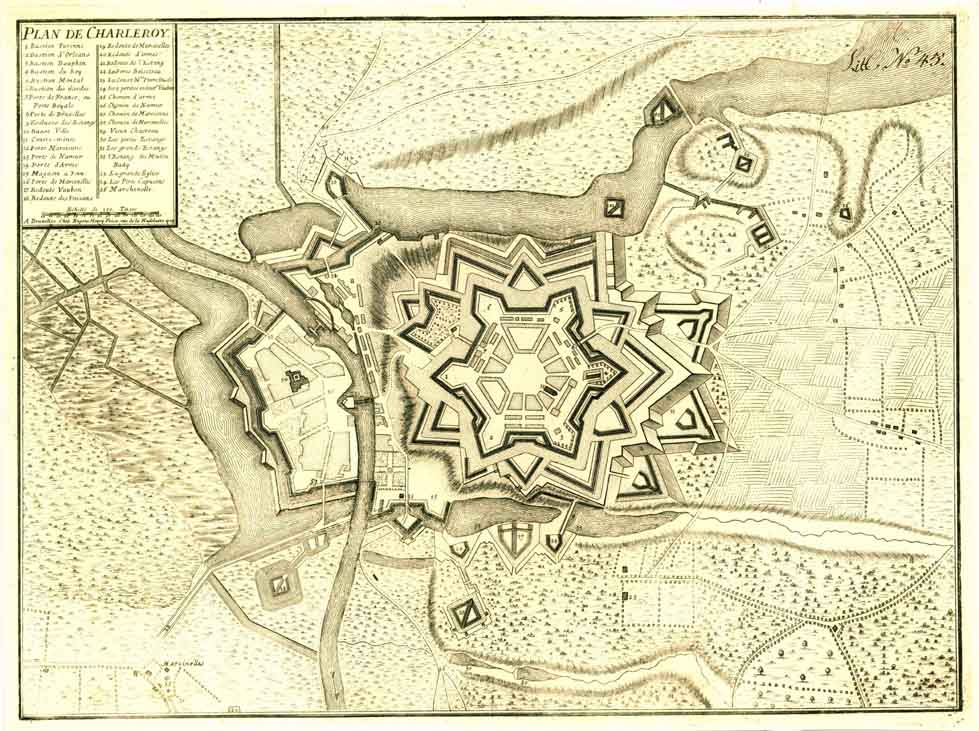 Plan de Charleroi par Vauban